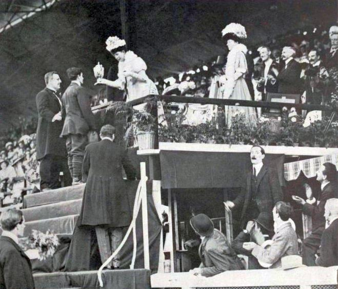 La reine Alexandra, aux JO de Londres 1908